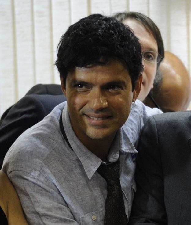 O cantor brasileiro Jorge Vercilo em Brasília. Numa cerimônia na qual o senador Randolfe Rodrigues, acompanhado de vários artistas, entrega à ministra de Relações Institucionais, Ideli Salvatti, o relatório final da CPI do Ecad.